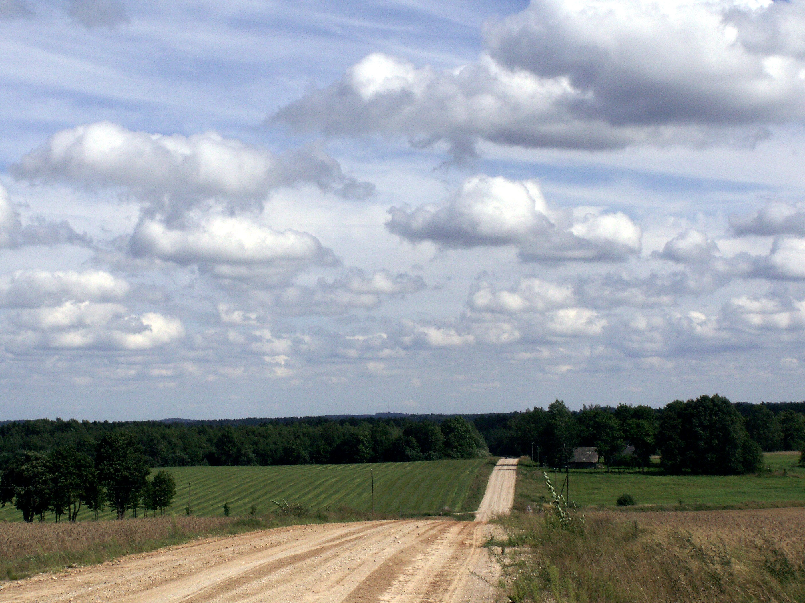 Širminiai, Šiaulių rajonas